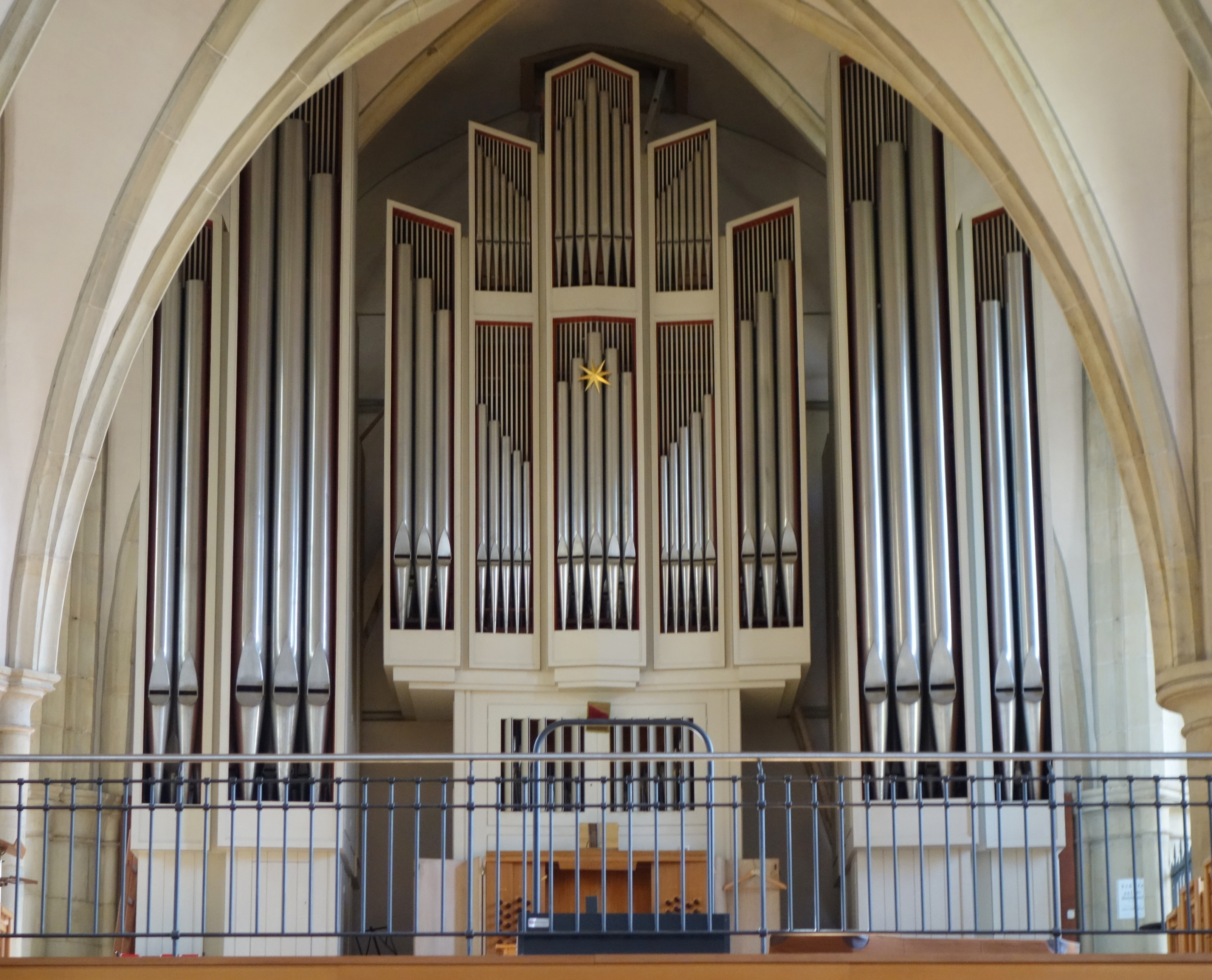 Apostelkirche Münster, Nordrhein-Westfalen, Deutschland